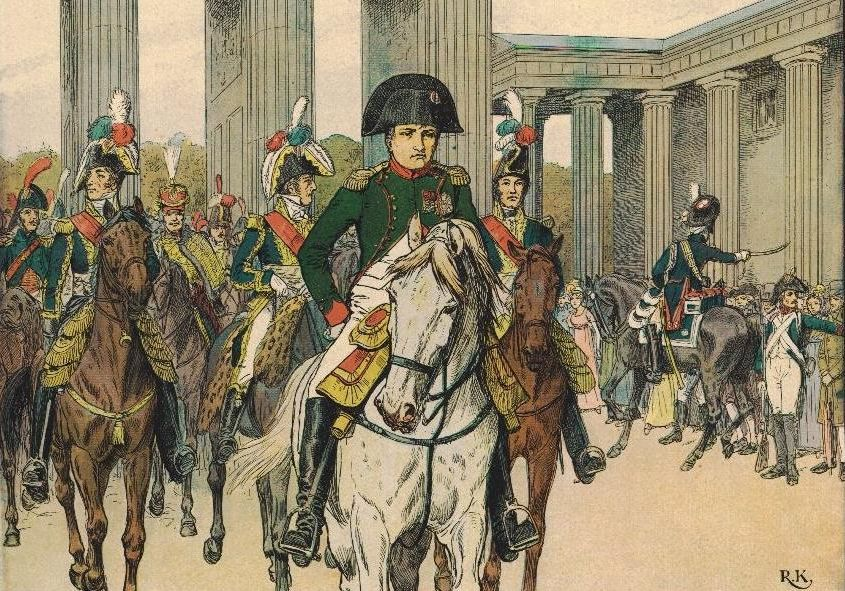 Einzug Napoleons in Berlin am 27. Oktober 1806